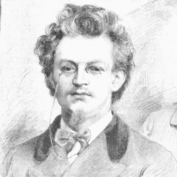 Portrét, nakreslený Janem Vilímkem pro Humoristické listy